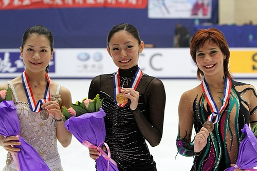 Akiko Suzuki, Miki Ando and Alena Leonova at the Cup of China 2010